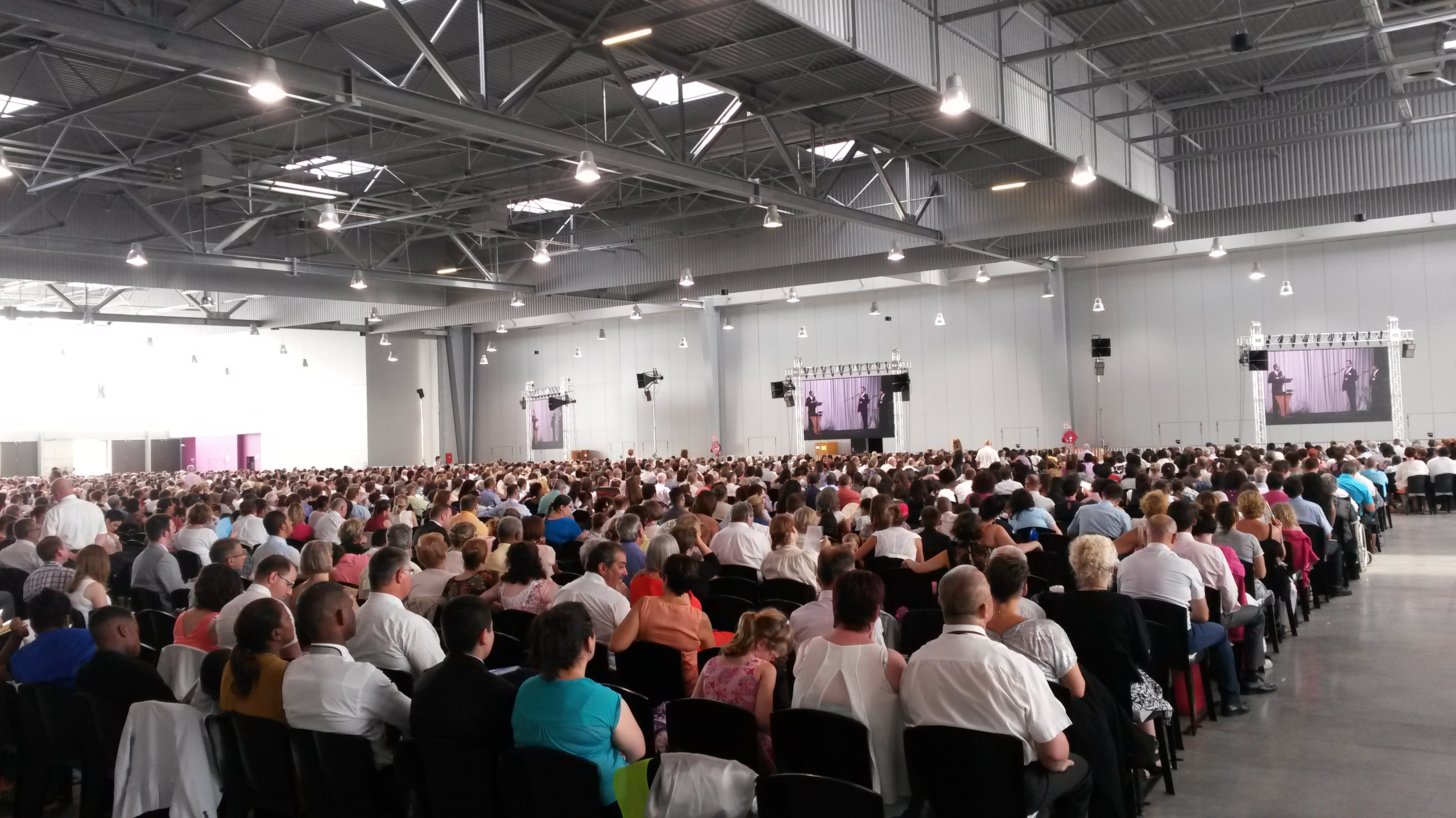 Assemblée régionale des Témoins de Jéhovah au Capitole de Châlons-en-Champagne (FRANCE)